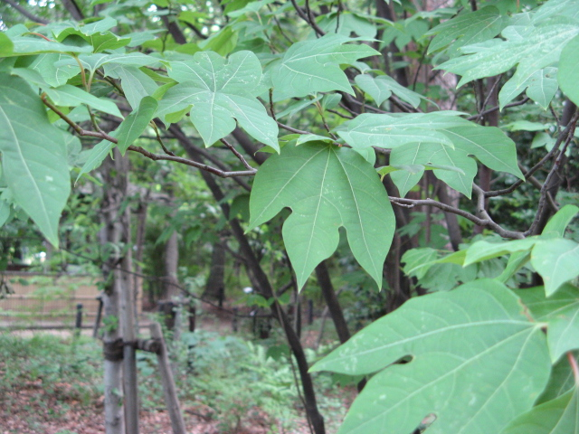 Lindera triloba(Leaves)